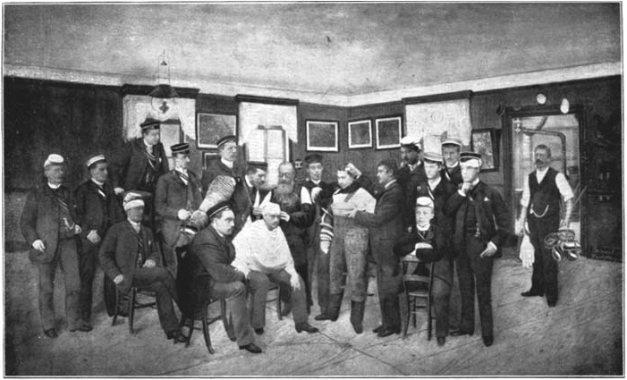 "Im Flickzimmer", Photomontage von 1885/86, Friedrich Immisch (Mitte), Paukarzt der Heidelberger Corps behandelt einen Fechter nach überstandener Mensur, Rechte abgelaufen, Public Domain